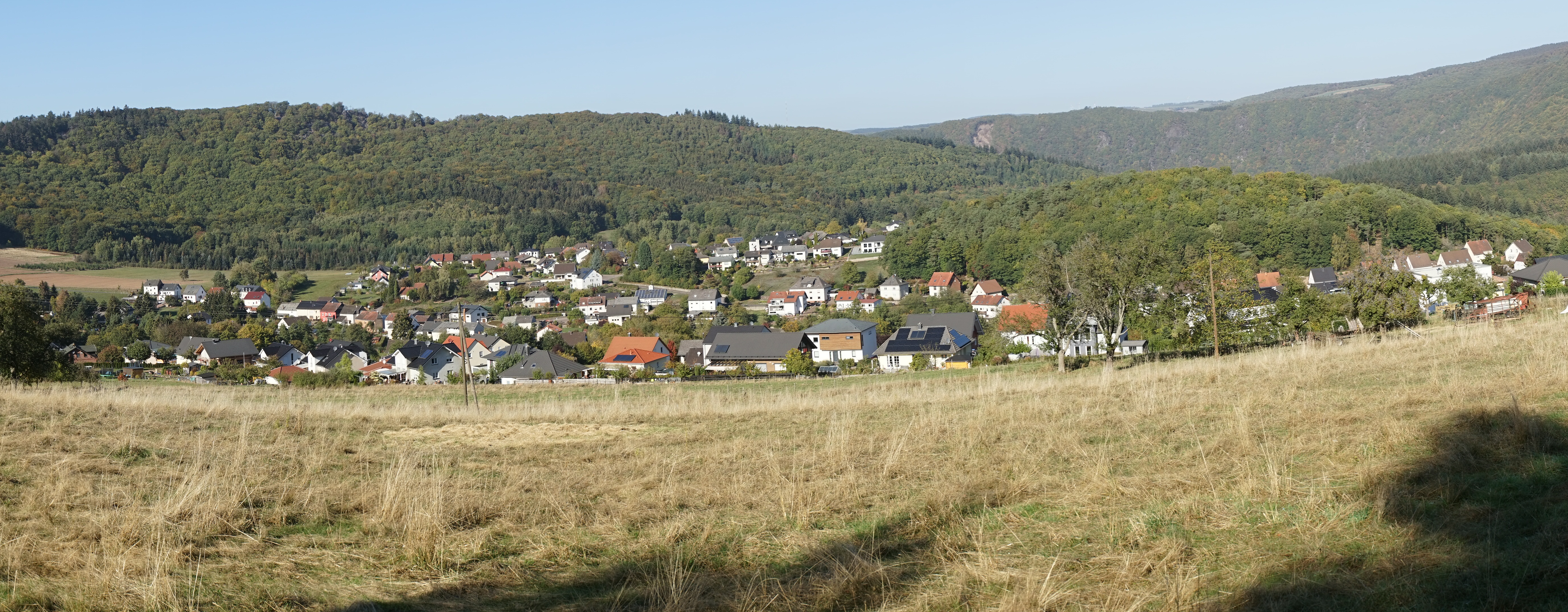 Blick auf die Ortslage, insbesondere auf den Ortsteil Rodt.